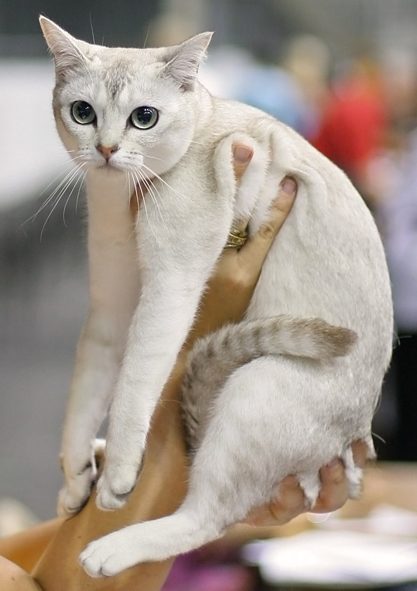 Burmilla femelle présentée en exposition féline à Vantaa en 2006. Code EMS : Ancelaine Lumikki [BML ns 11] female EX1 CAC BIV